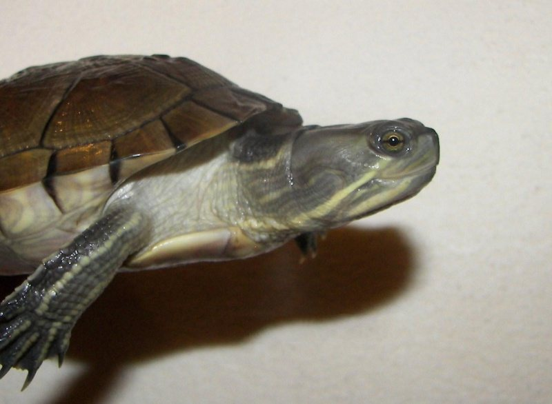 tortue vu de coté